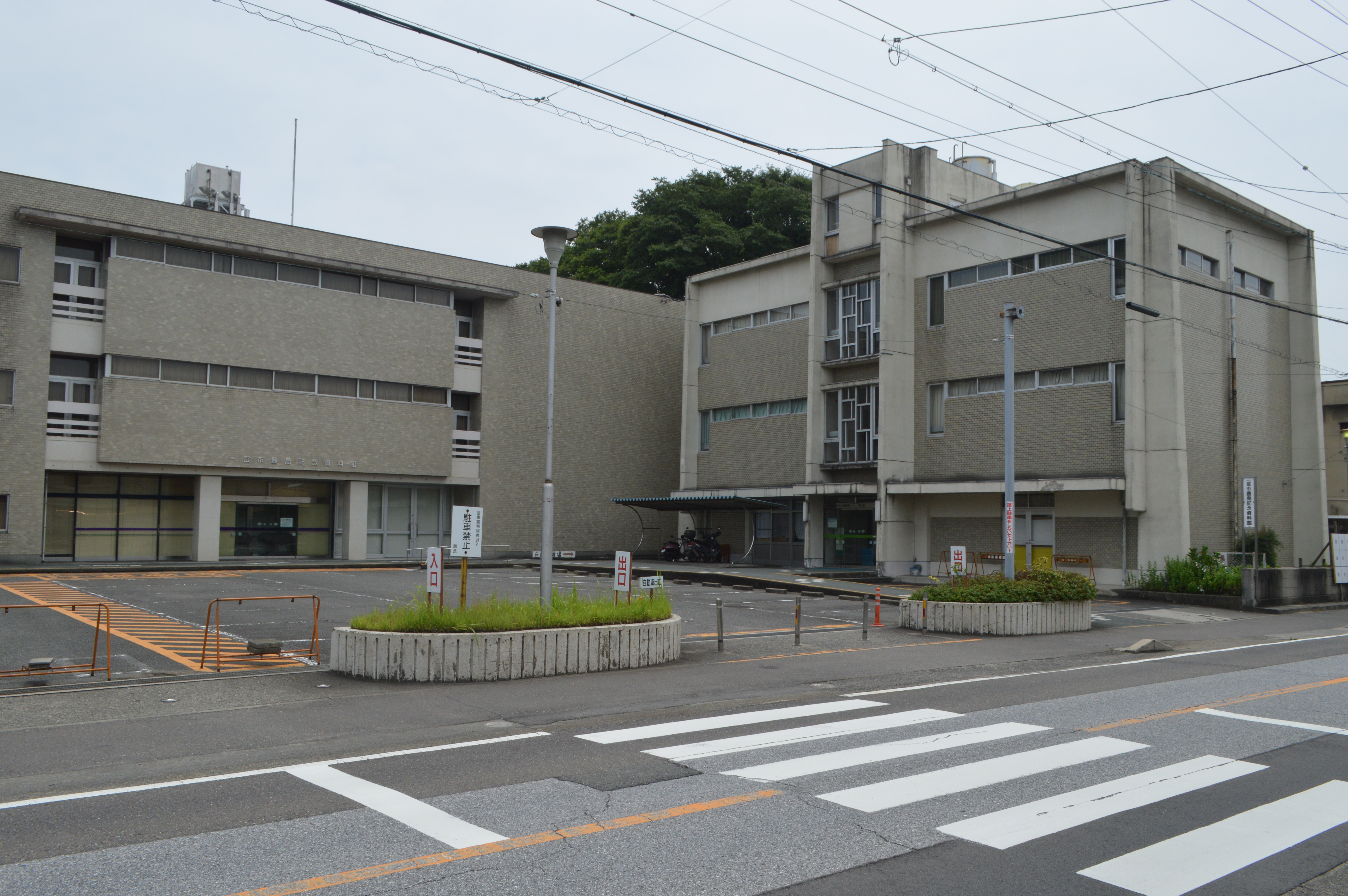 一宮市博物館豊島記念資料館（旧・一宮市立豊島図書館）